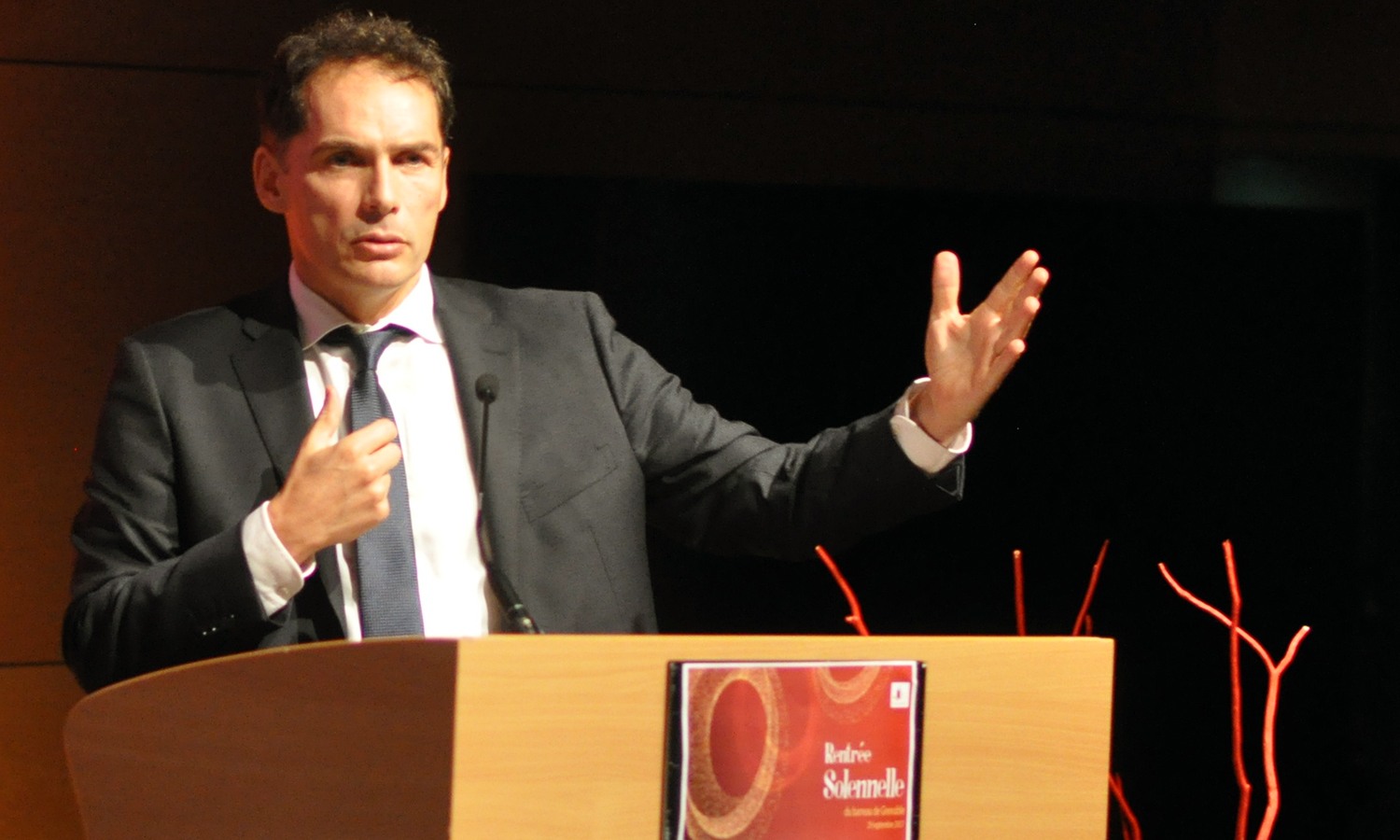 Intervention rentrée solennelle barreau de Grenoble.